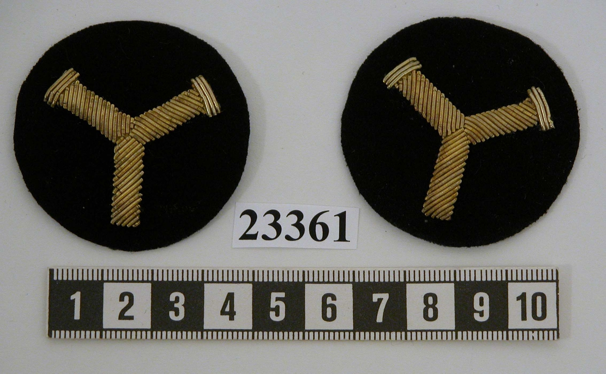 Yrkesbeteckning för torpedmästare vid svenska flottan, modell 1927.